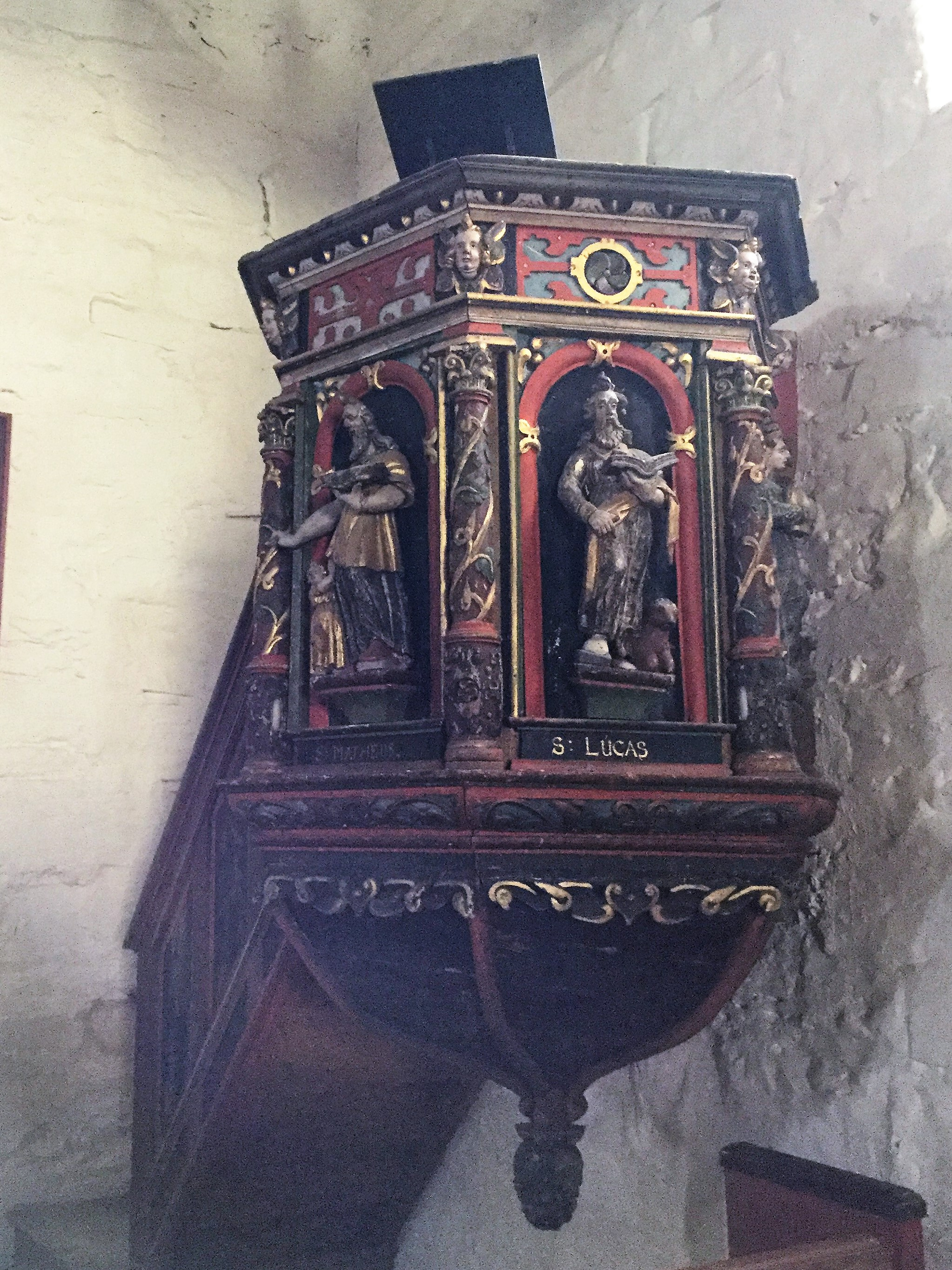 Prekestolen i Sakshaug gamle kirke